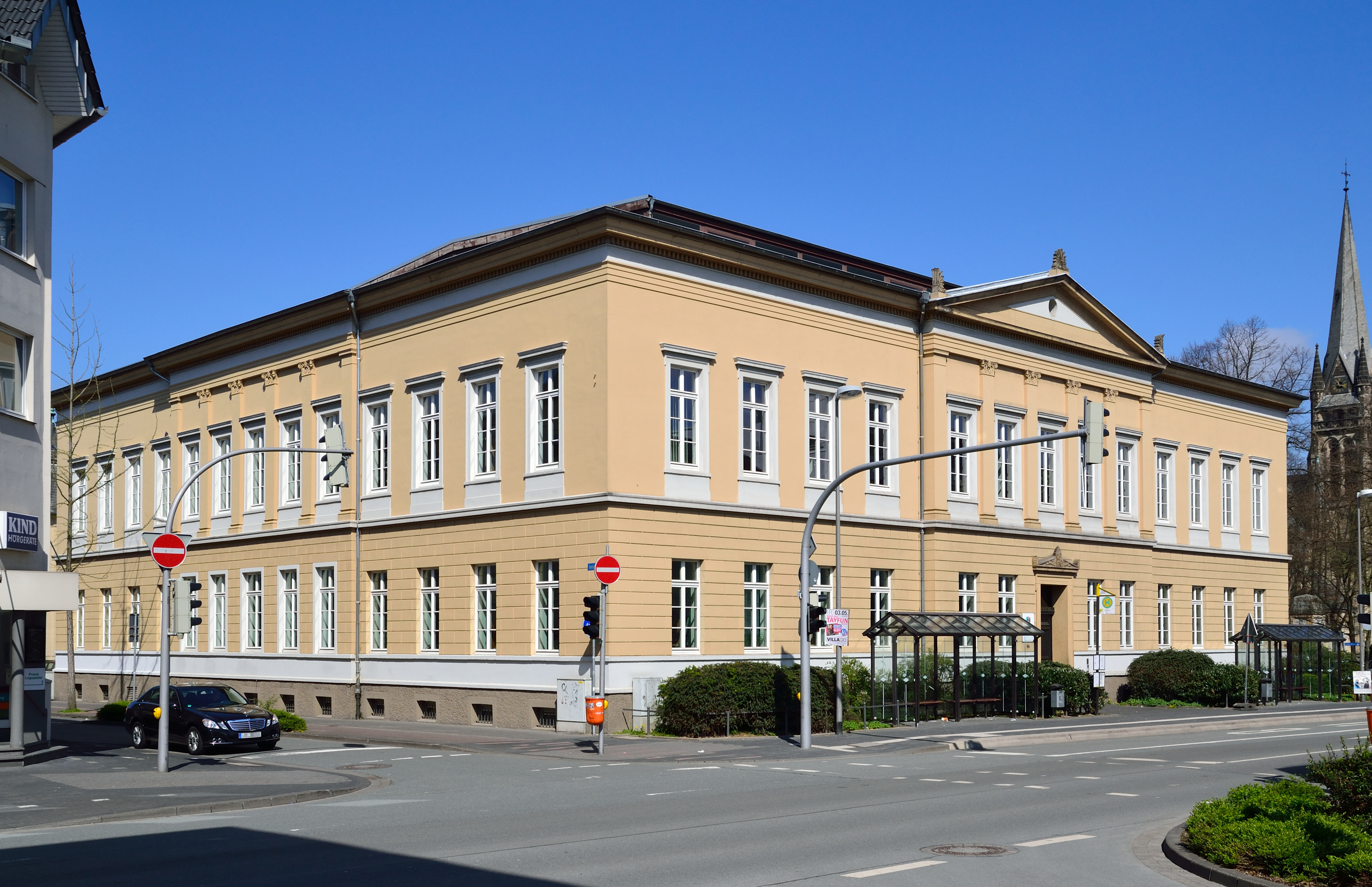 This is a photograph of an architectural monument. Landgericht Detmold an der Paulinenstraße